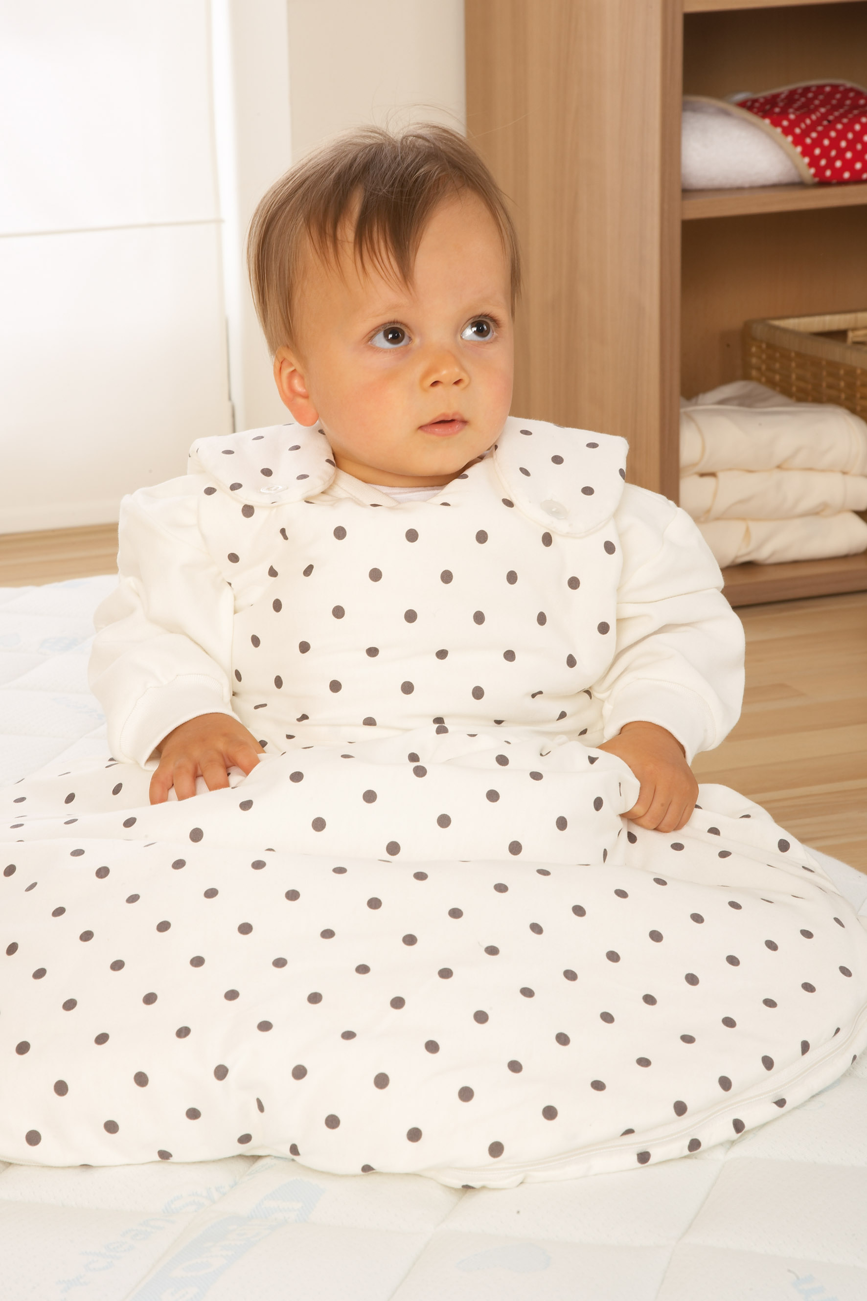 Babyschlafsack 'Baby-Mäxchen' von Alvi